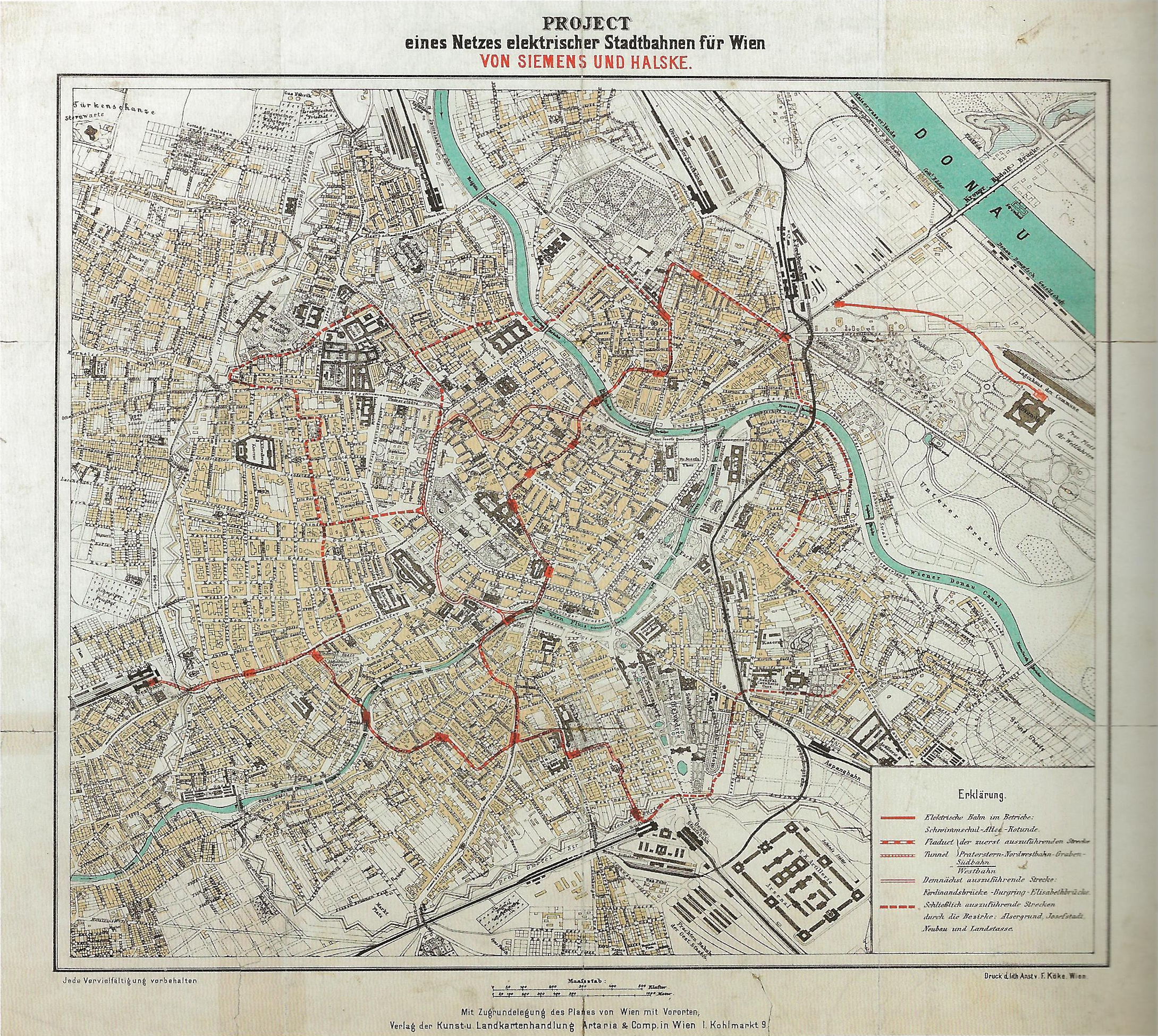 Projekto de la entrepreno Siemens & Halske por urbfervojo de Vieno